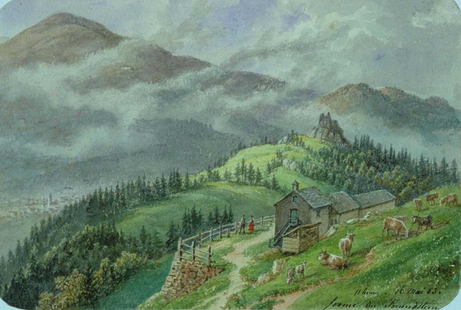 Ferme du Freundstein à Goldbach-Altenbach par Jean-Nicolas Kart le 16 mai 1853 à 11h. Aquarelle